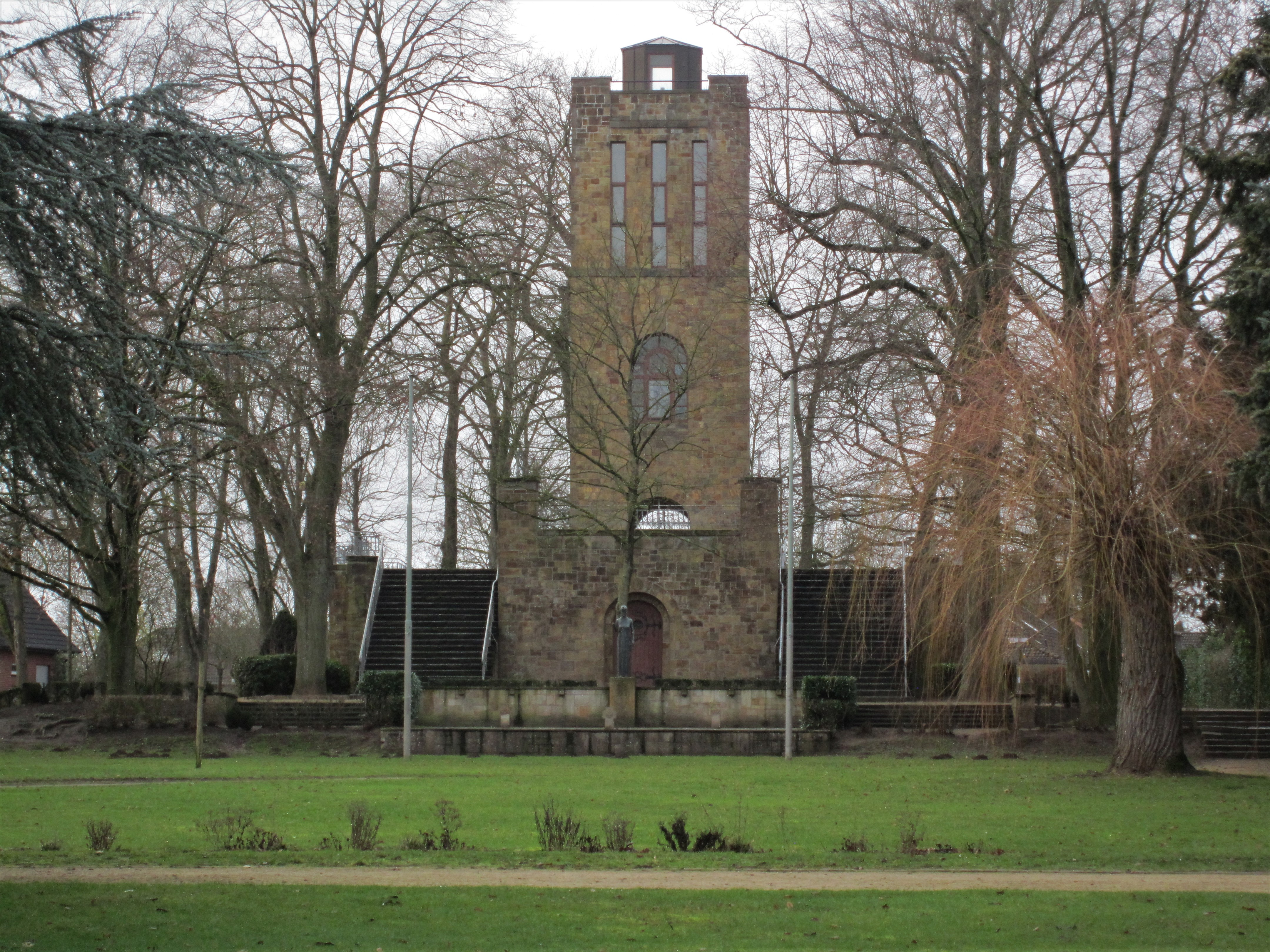 1934 eingeweihtes Ehrenmal für die Gefallenen des Deutsch-Französischen Krieges (1870/71) und des Ersten Weltkriegs auf einer Anhöhe oberhalb Bramsches mit Aussichtsturm